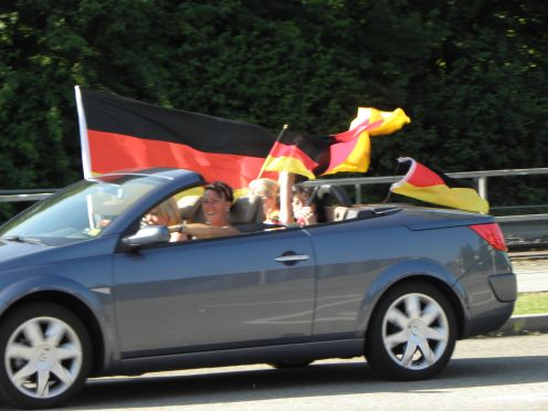 Auto in "Schland" Farben